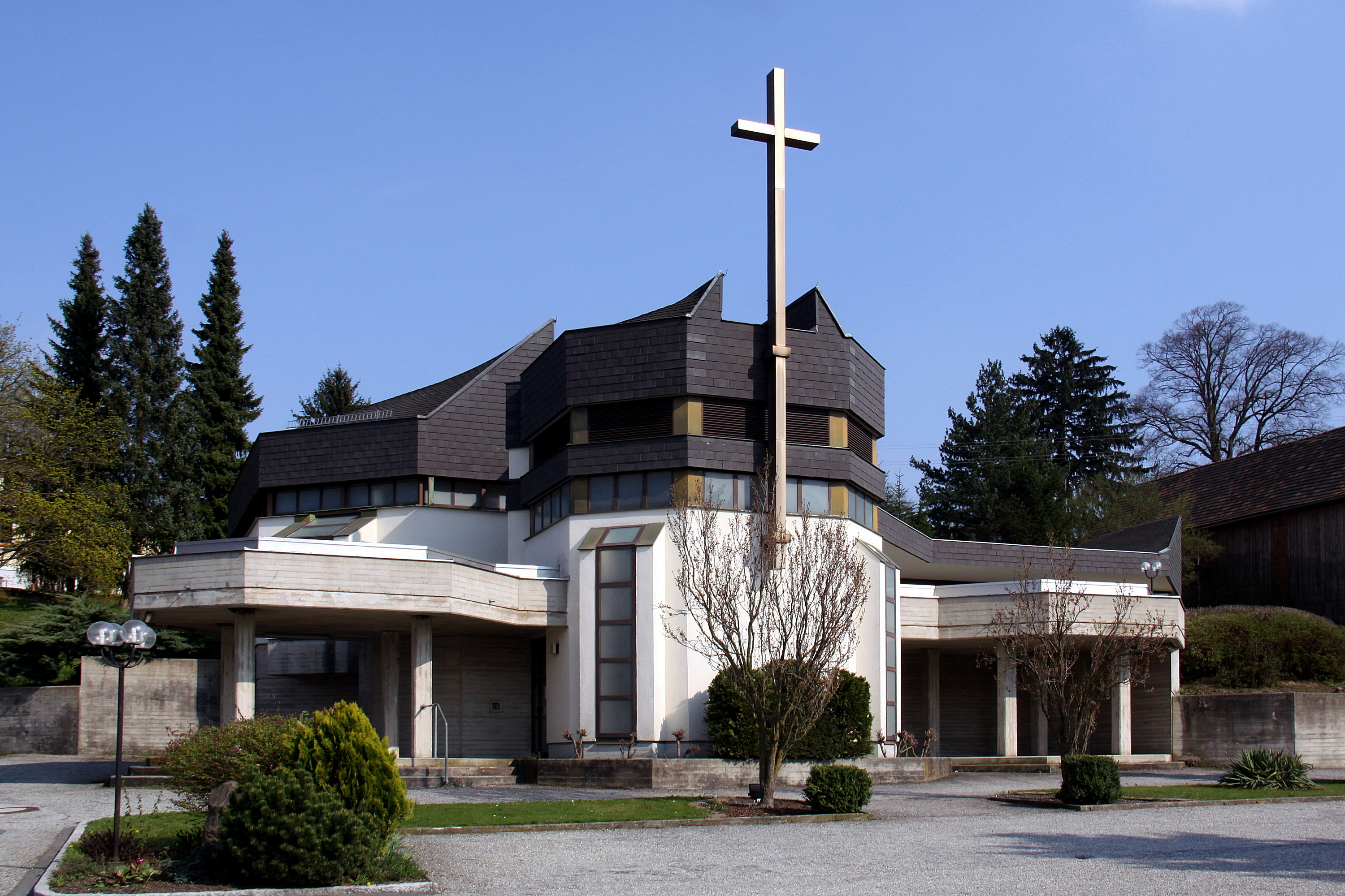 Kohfidisch - Filialkirche . Object location 47° 10′ 30.00″ N, 16° 21′ 30.75″ E This and other images at their locations on: Google Maps - Google Earth - OpenStreetMap - Proximityrama(Info)